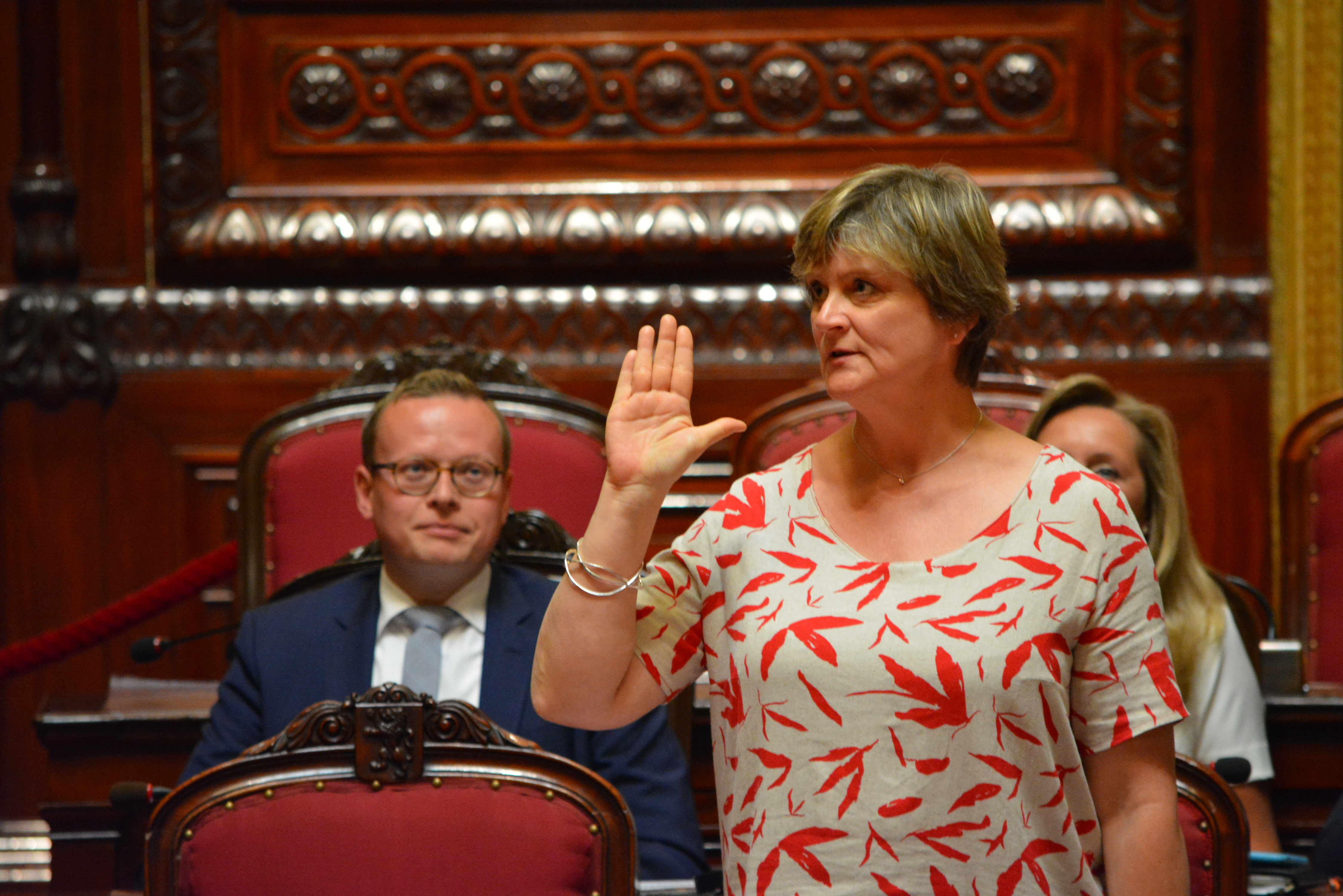 Prestation de serment de Sabine Laruelle au Sénat de Belgique, le 04 juillet 2019.